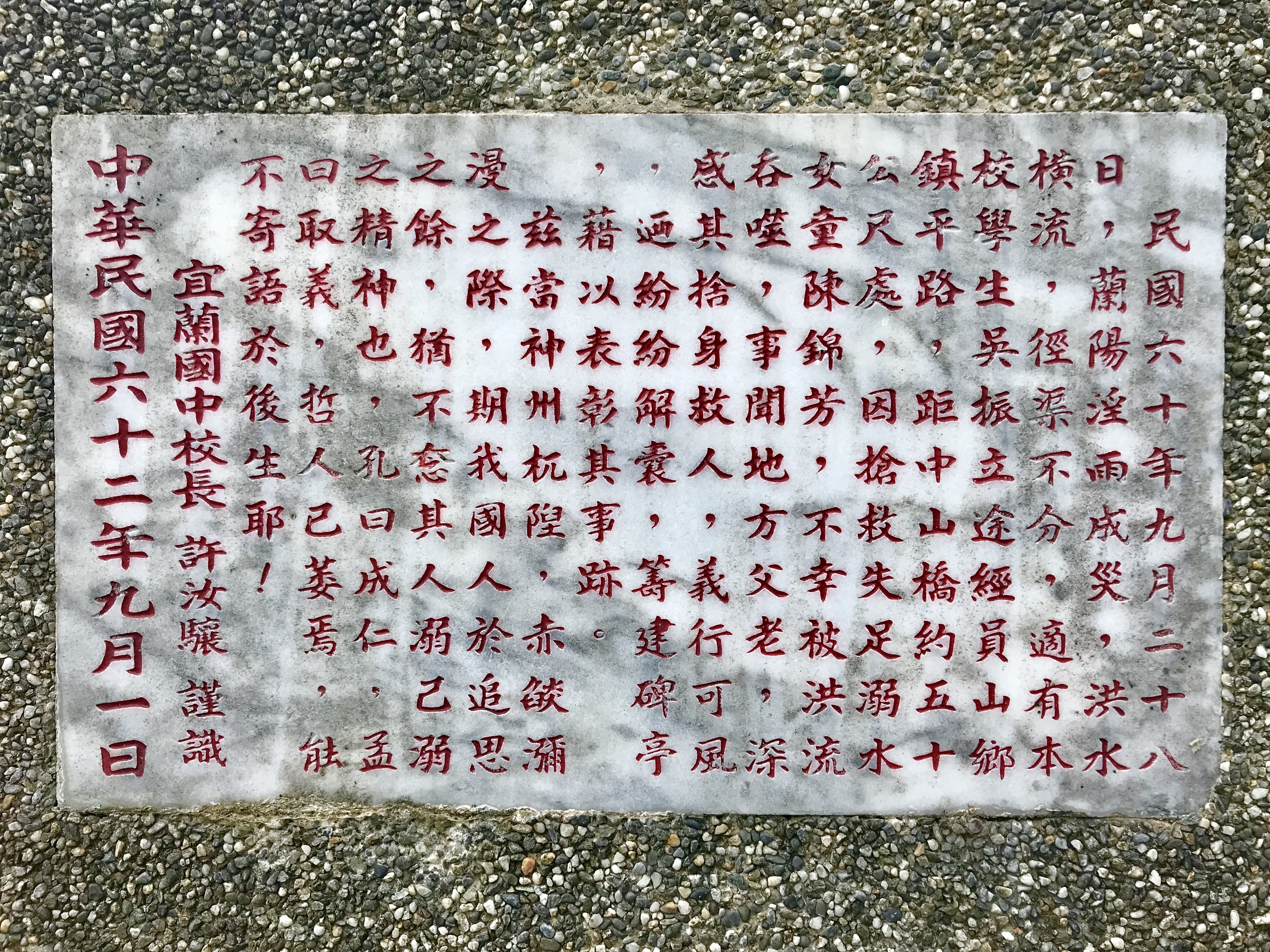 吳振立義人紀念碑文